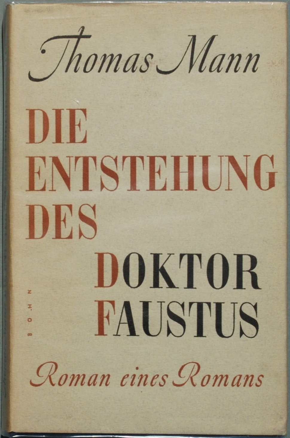 Tomas Mann: Die Entstehung des Doktor Faustus. Roman eines Romans. [Amsterdam:] Bermann-Fischer 1949, 204 Seiten; Erstdruck (Potempa G 1027.1, Bürgin I 84, Wilpert/Gühring² 112).